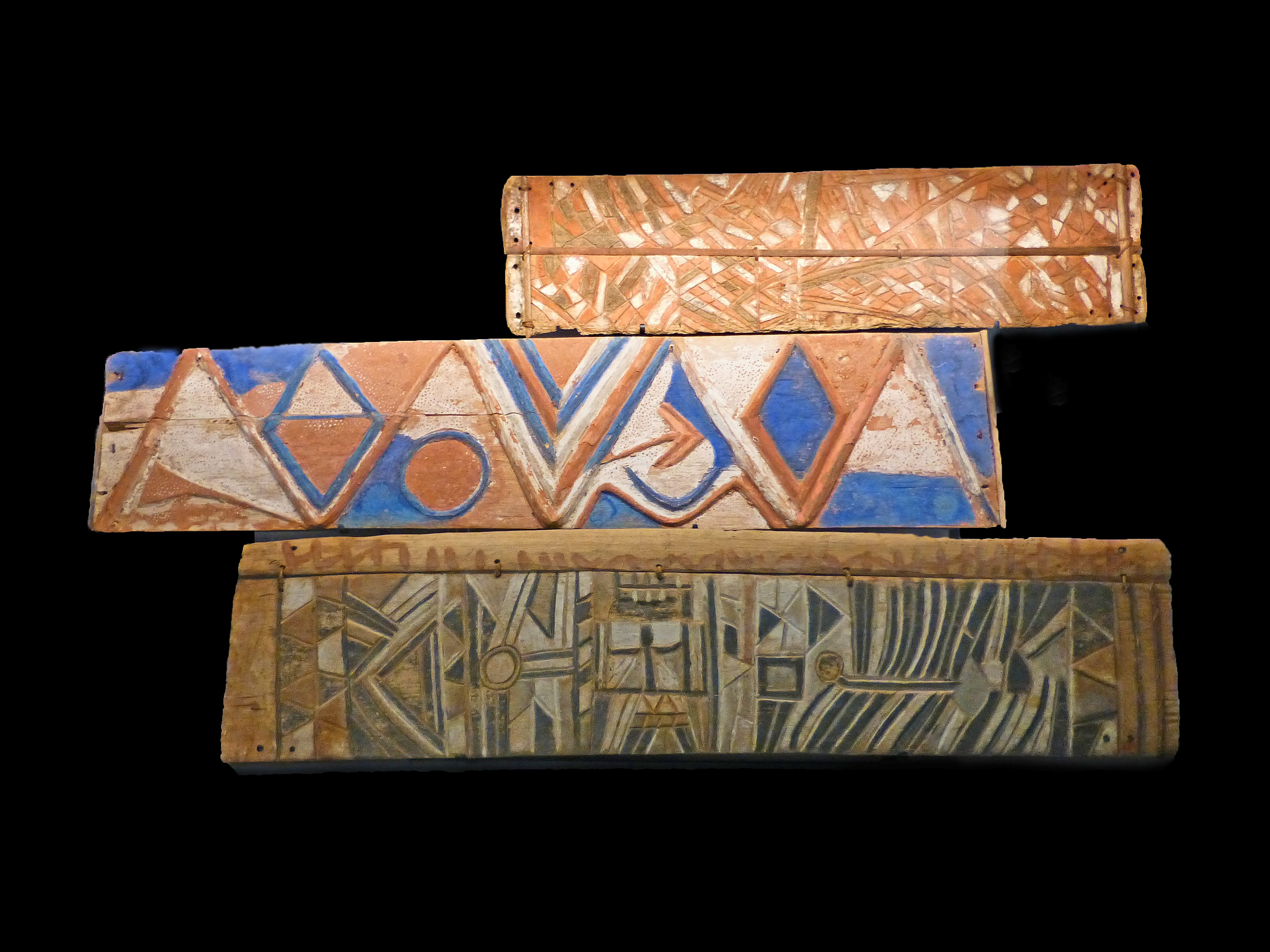 Planches de lit rituelles (nkita mboungou) Population Téké-Tsayi, Congo 20e s. Bois, pigments Musée du Quai Branly N° d'inventaire : 73.1999.1.3 ; 73.1999.1.1 ; 73.1999.1.2 . Notices du musée du quai Branly : [1] ; [2] ; [3].